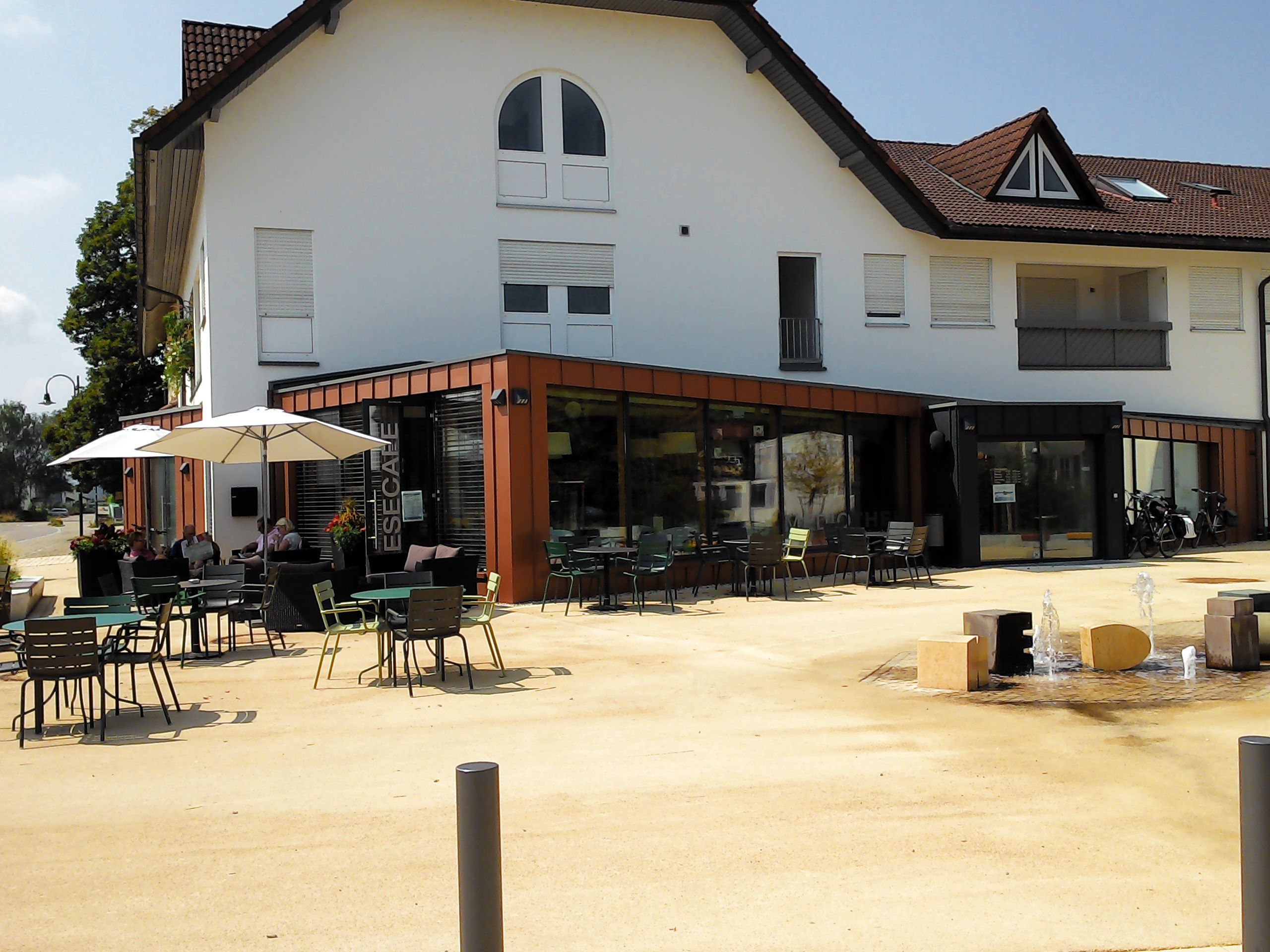 Wutöschingen (Gemeinde), Landkreis Waldshut, Baden-Württemberg. Mediothek im Ortskern.